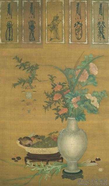 中文（香港）: 天中佳景圖